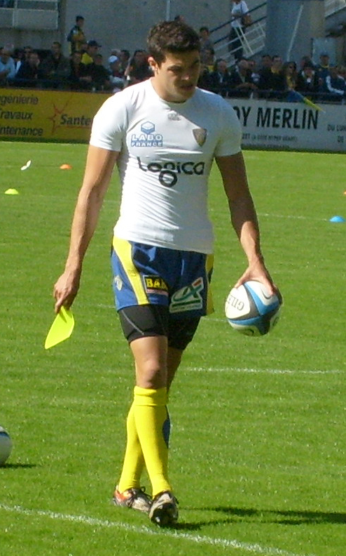 Anthony Floch s'échauffent avant d'affronter l'Aviron Bayonnais dans les rangs de l'ASM Clermont Auvergne au stade Marcel Michelin de Clermont-Ferrand.